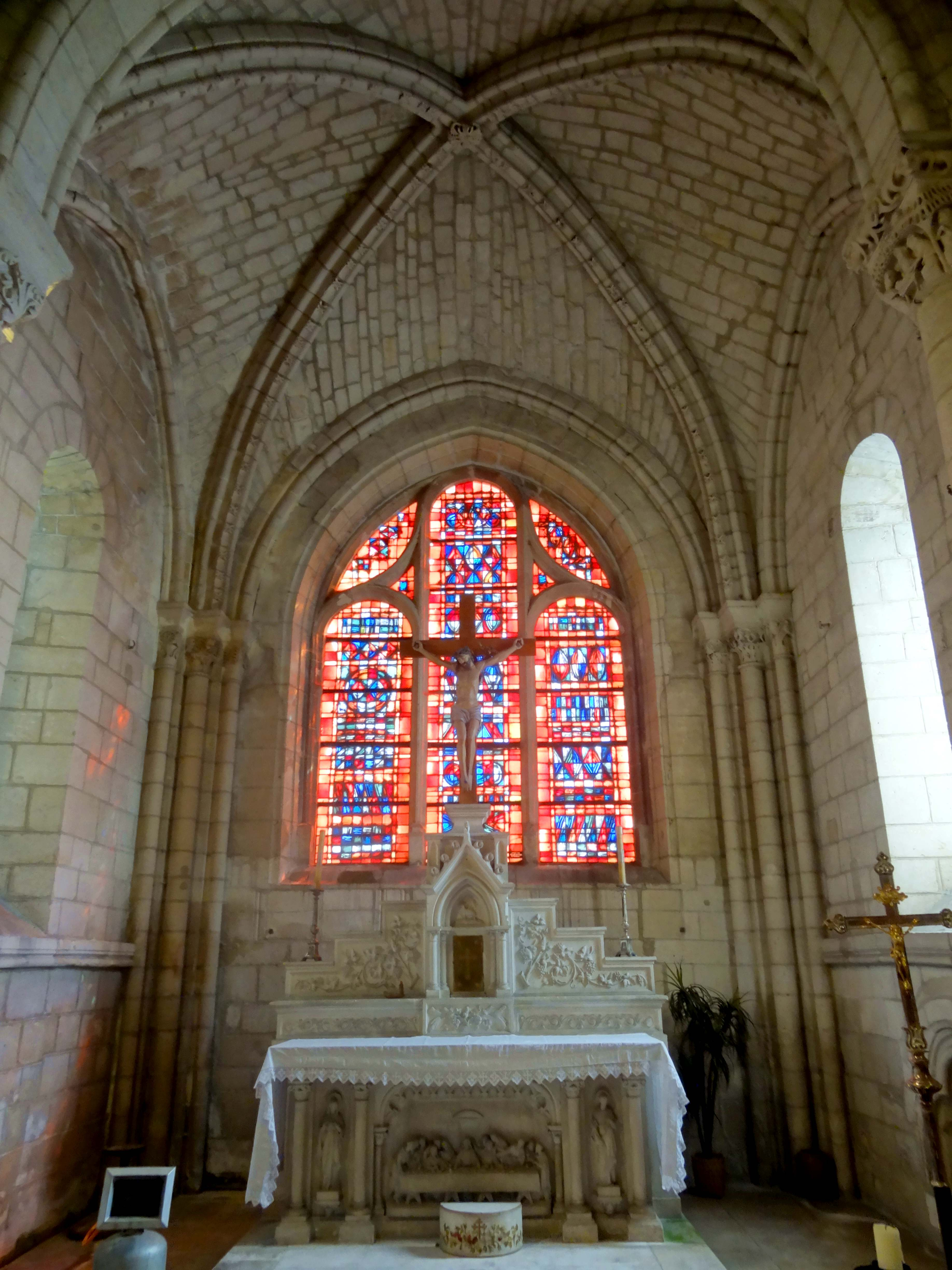 Intérieur de l'église - voir titre.